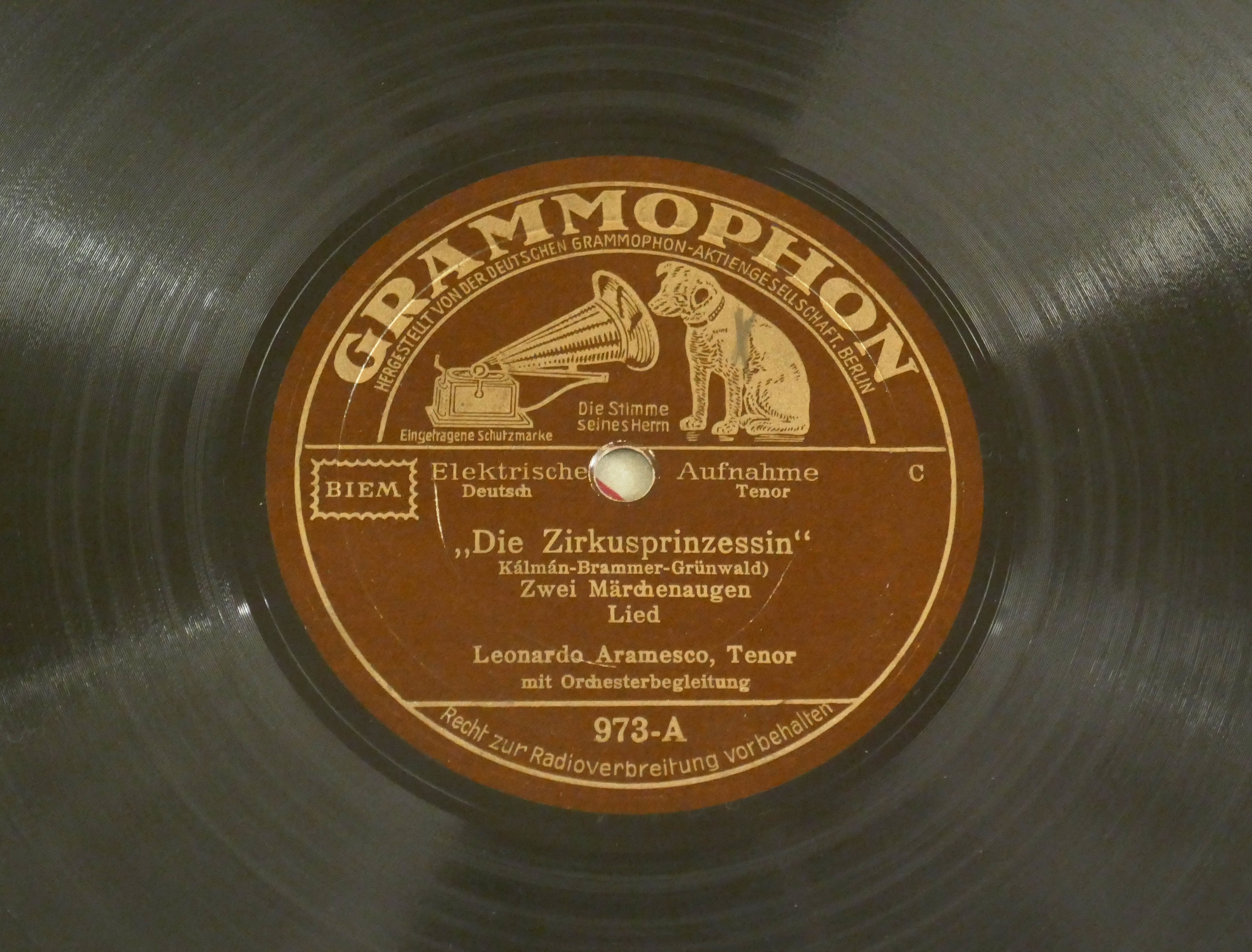 Deutsche Grammophon Schallplatte - Leonardo Aramesco, Tenor in "Die Zirkusprinzessin".